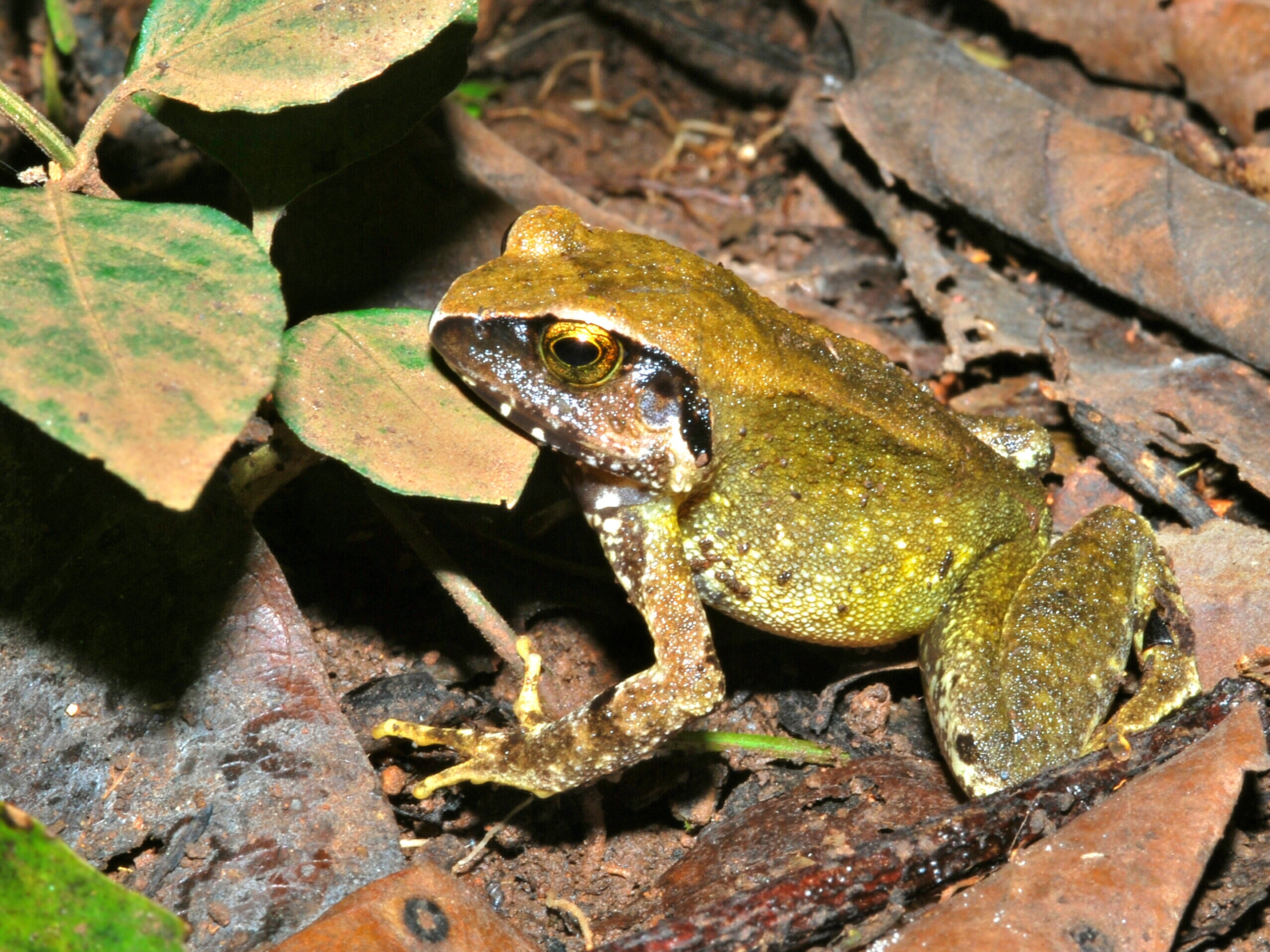 Mabira Forest, UGANDA